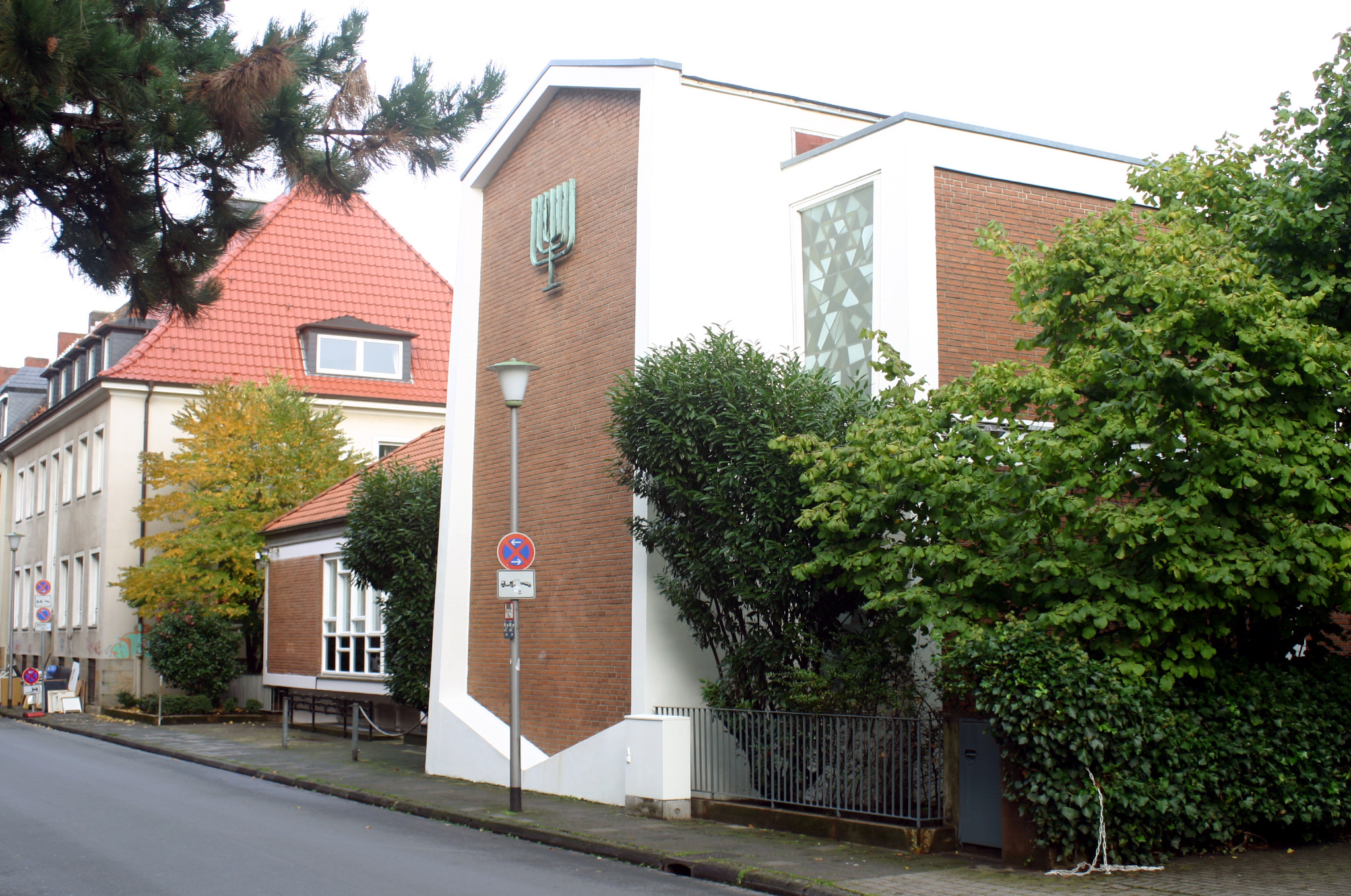 Münster, Germany, Synagoge an der Klosterstraße